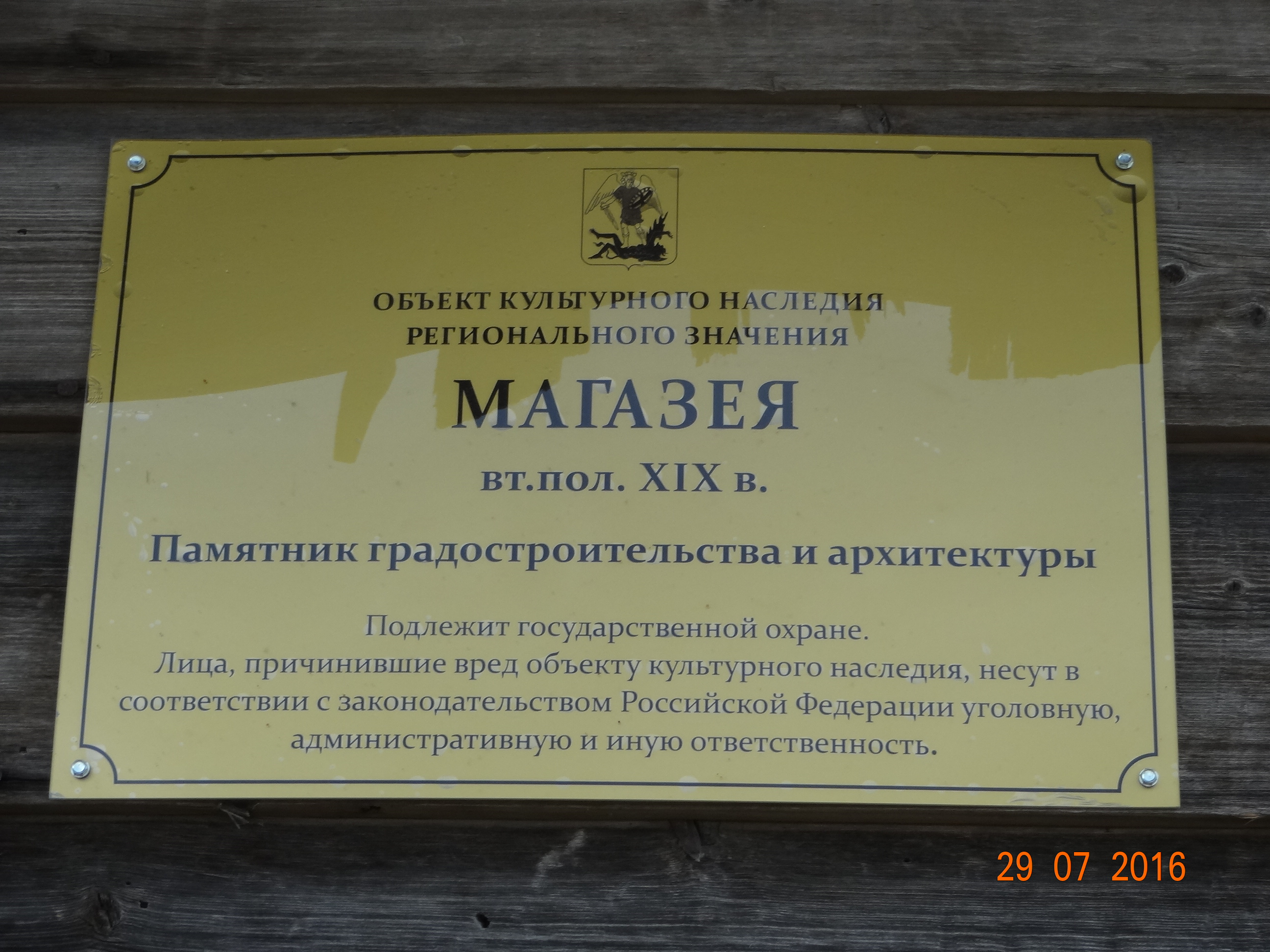 табличка